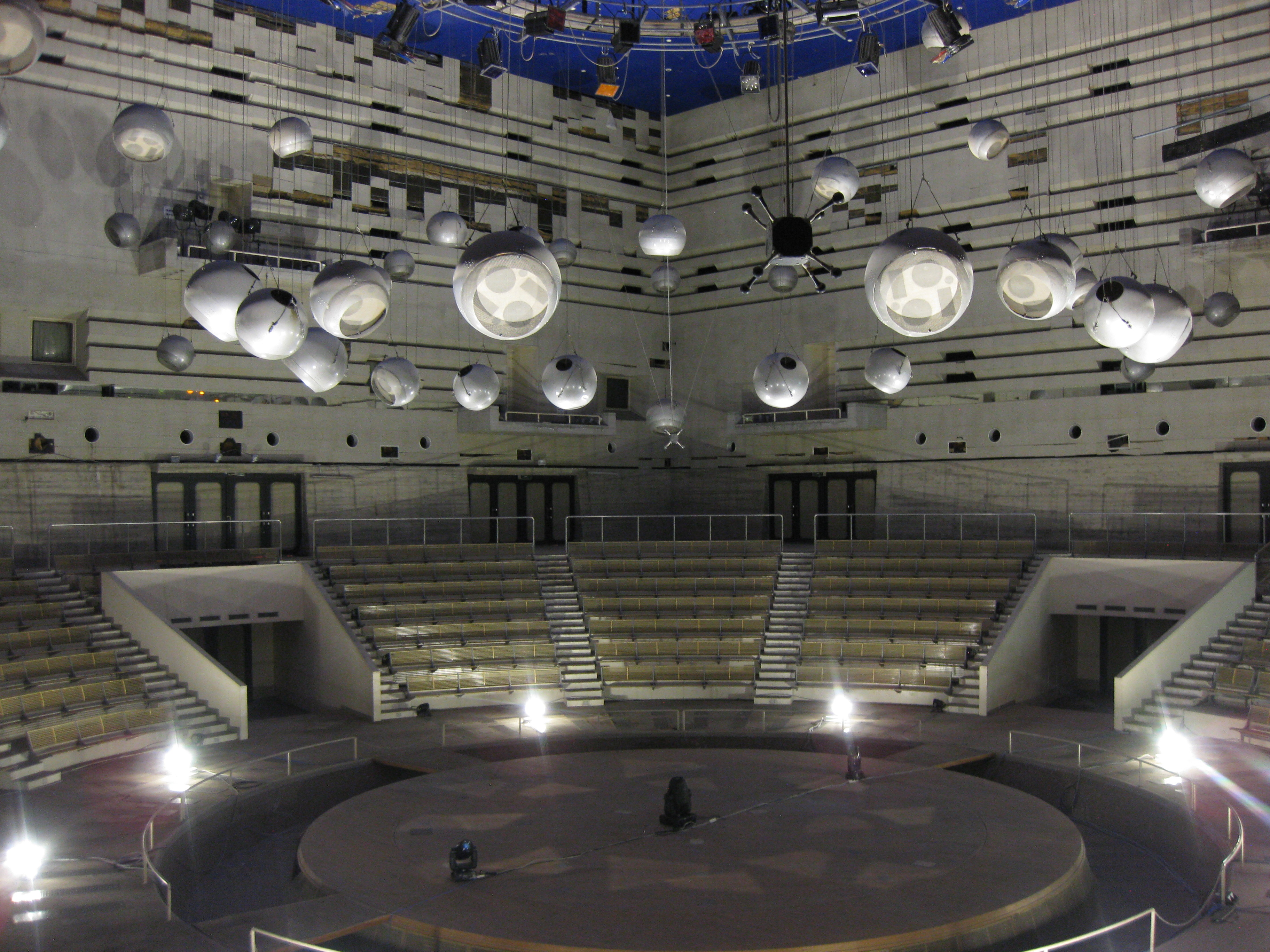 鉄鋼館内部のスペースシアター。EXPO '70 パビリオン通路からアクリル越しに撮影。